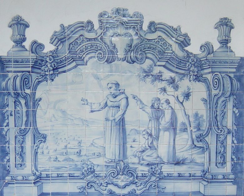 Santo António pregando aos peixes